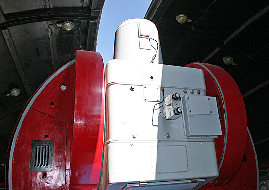 Оптико-электронный комплекс контроля космического пространства ОЭК «Окно» (г. Нурек, Республика Таджикистан)